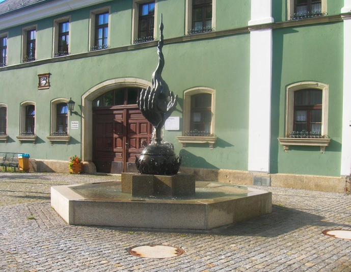 Zoigl-Brunnen, sog. "Zoigl-Pentaptychon" vor dem Rathaus 92693 Eslarn. Bronze-Plastik symbolisierend einen (Bier)Sudkessel mit von oben strömendem Wasser, auf steinernem, symbolisierten "fünfzackigen" Zoigl-Stern.